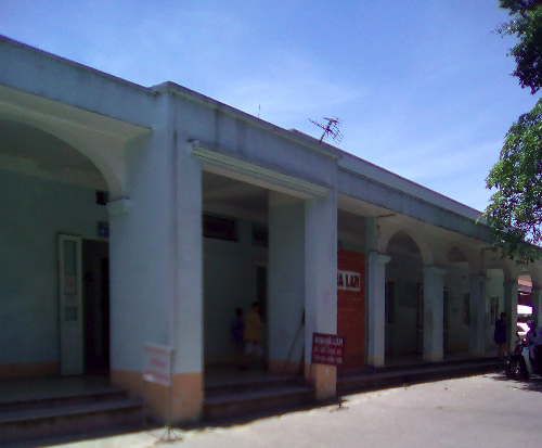 ギアラム駅